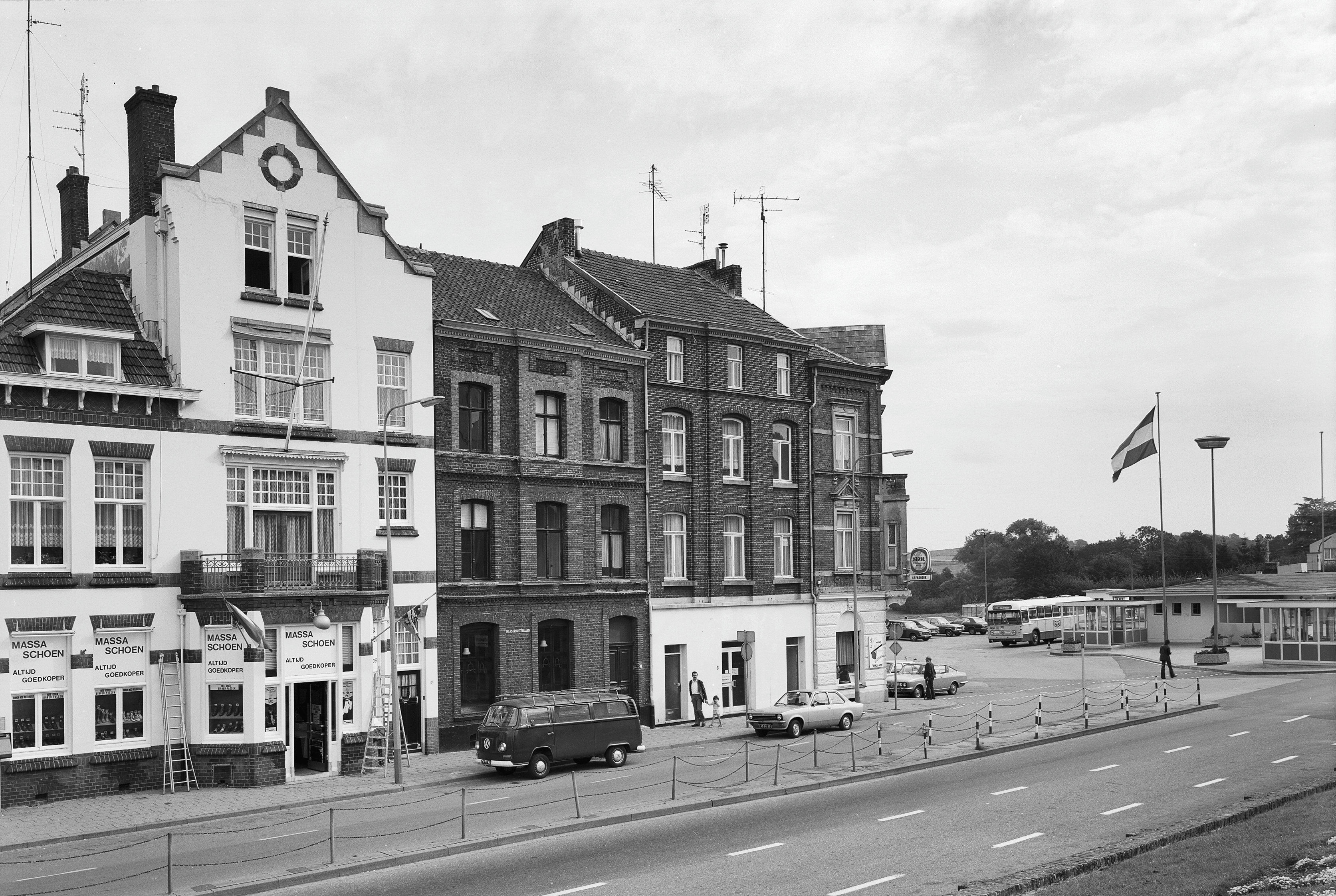 voorgevels